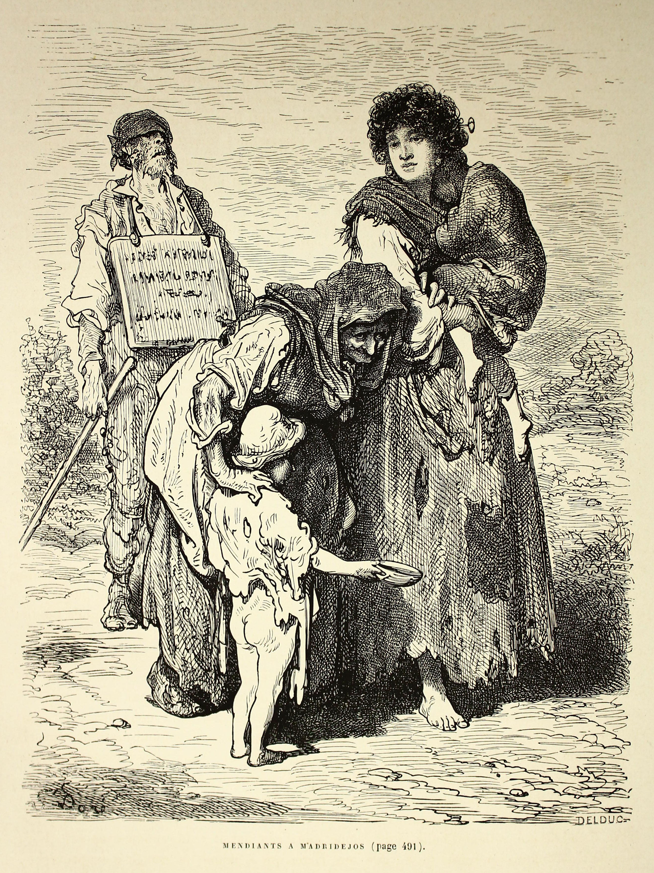 Autor: Davillier, Jean Charles, barón, 1823-1883 Descripción bibliográfica: L'Espagne / par Le Baron CH. Davillier ; ilustrée de 309 gravures dessinées su bois par Gustave Doré. - Paris : Librairie Hachette, 1874. - 799 p. : il. Materia: España- Geografía Materia: España- Usos y costumbres Ilustrador: Doré, Gustave, 1832-1883 Editor: Libreria Hachette Lugar de impresión: Francia, París Localización: Libro completo